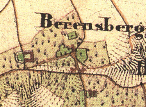 Abbildung des Schlosses Berensberg im rheinisch-westfälischen Urkataster